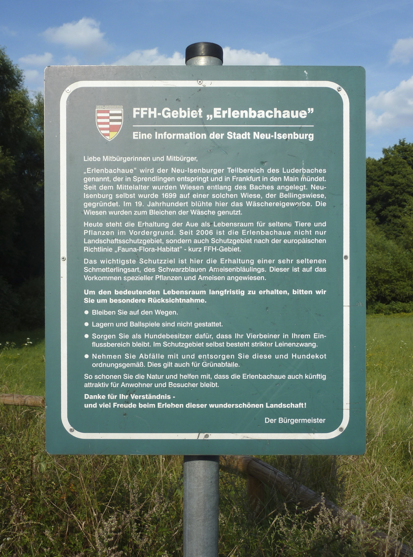 Der Königsbach, auch Luderbach und gelegentlich Erlenbach genannt, ist ein etwa 13,7 km langer, linker (südlicher) Zufluss des Mains in Hessen. Er entspringt bei der Stadt Dreieich im Landkreis Offenbach, durchfließt Neu-Isenburg und mündet im Stadtteil Niederrad von Frankfurt am Main. Das Foto zeigt eine amtliche Infotafel am FFH-Gebiet Erlenbachaue in Neu-Isenburg, das vom Bach durchflossen wird.